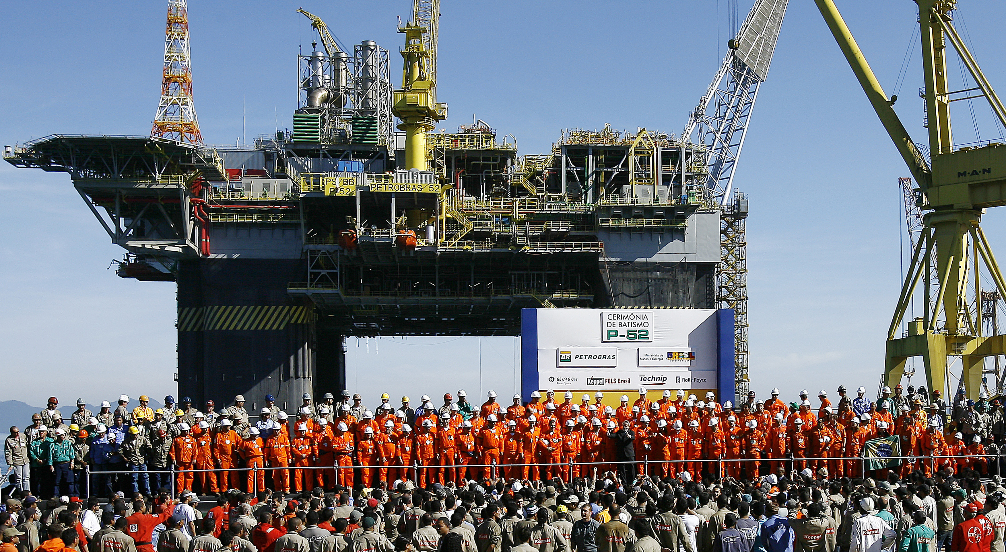 Angra dos Reis (RJ) - Presidente Luiz Inácio Lula da Silva durante cerimônia de batismo da Plataforma P-52, ao lado de funcionários da Petrobrás.